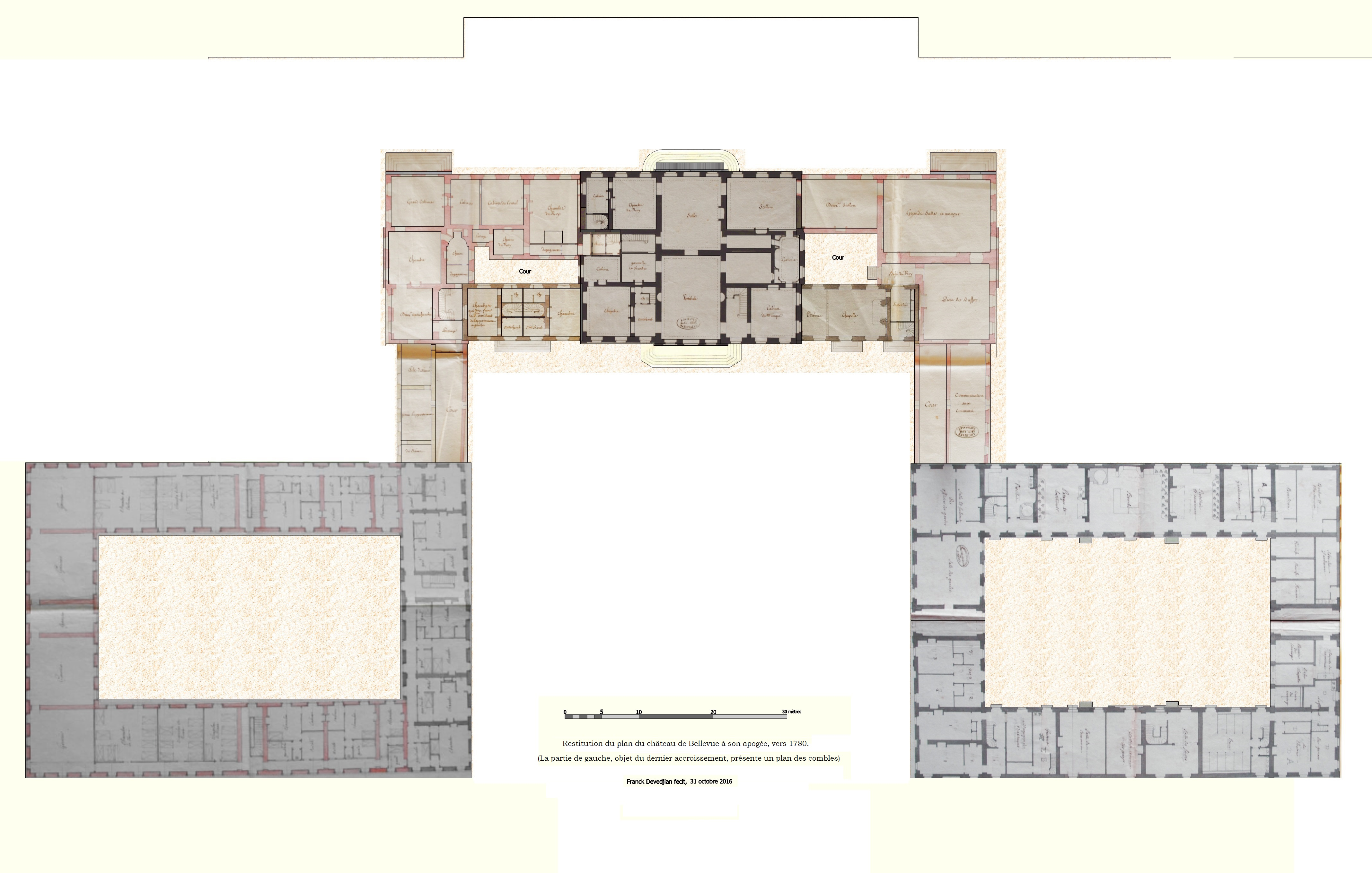 Plan du château de Bellevue à son apogée, avec l'agrandissement de l'aile des bains à gauche, vers 1780.